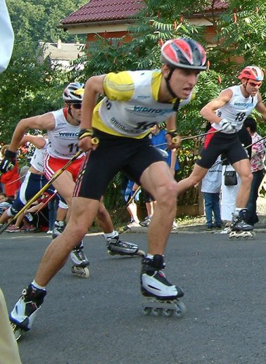 Björn Kircheisen during the Sommer Gand Prix in Steinbach-Hallenberg